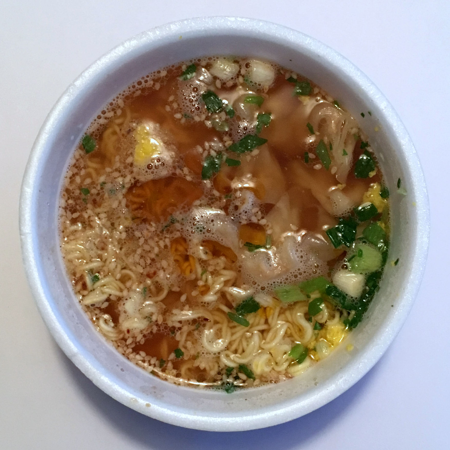 日清食品 出前一丁（即席カップ麺）